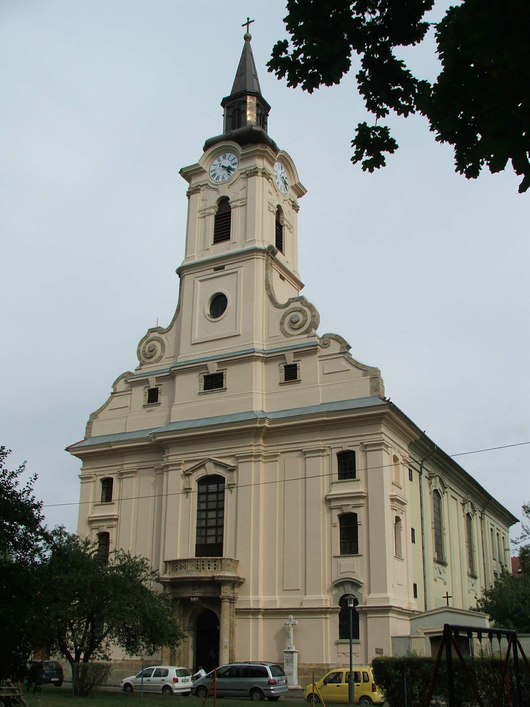 Esztergom, Hungary St. Peter's & St. Paul's church